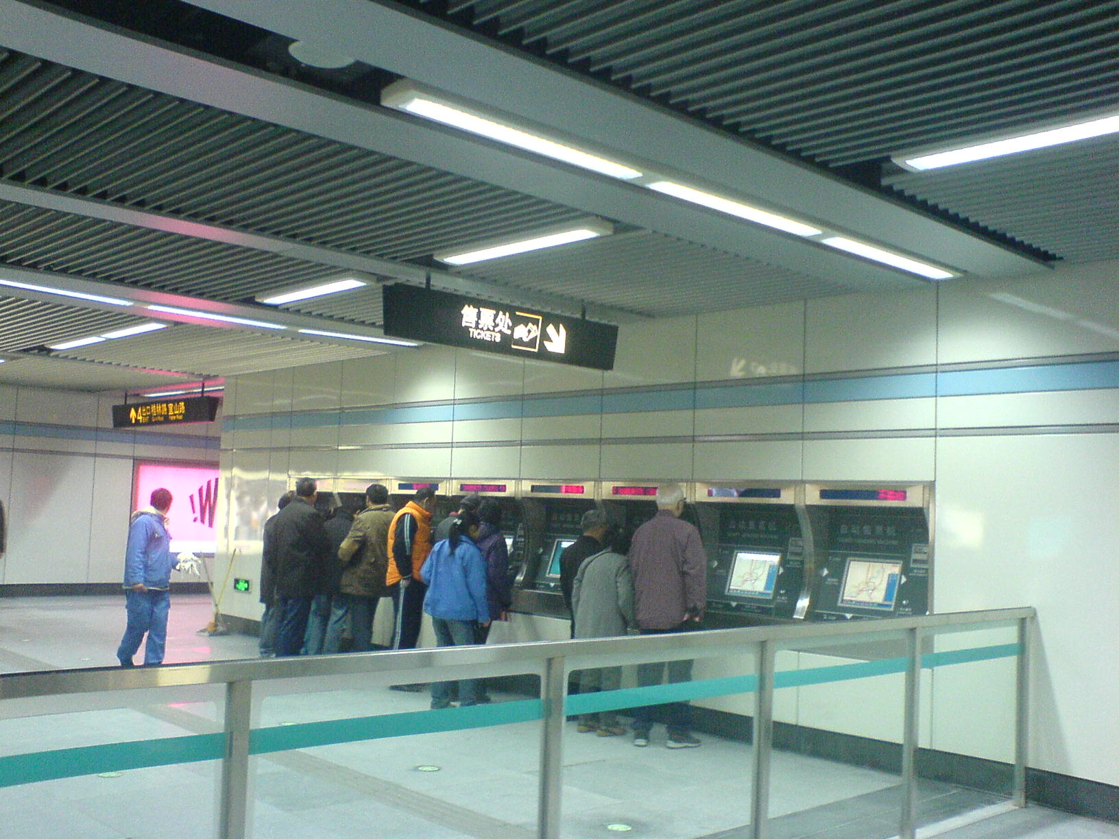 桂林路站站厅